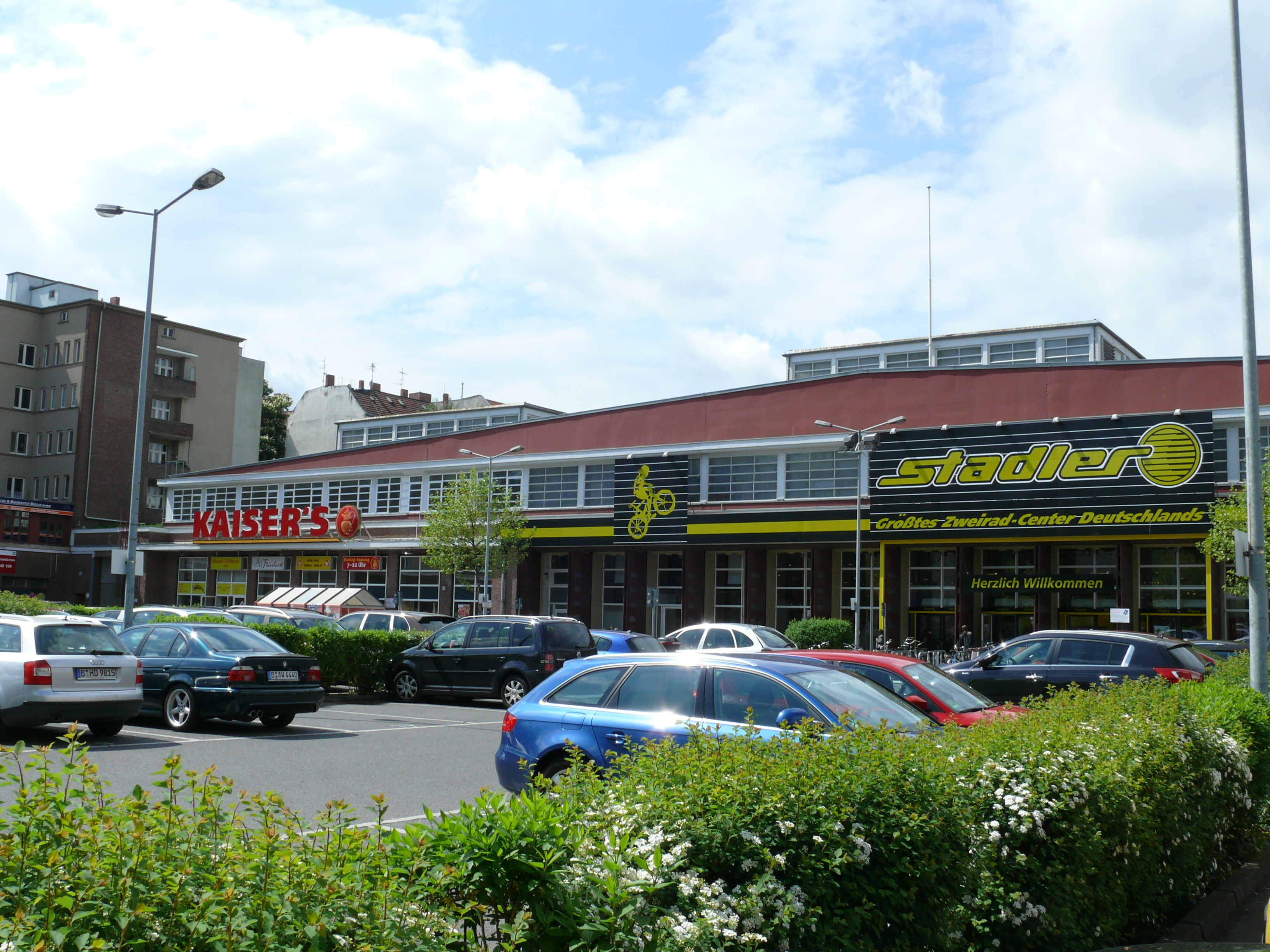 Berlin-Westend Königin-Elisabeth-Straße Betriebshof